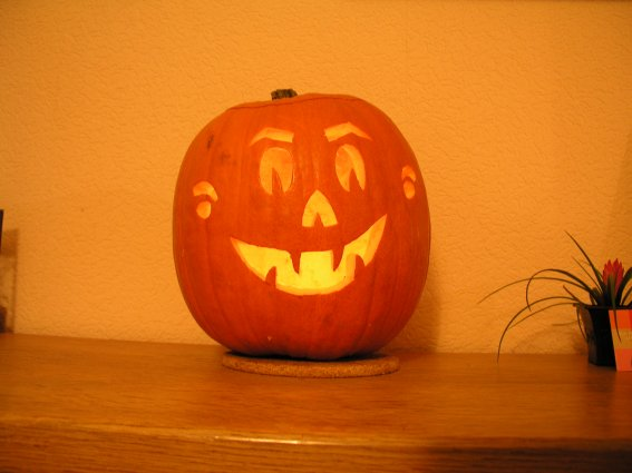 Citrouille d'intérieur pour Halloween